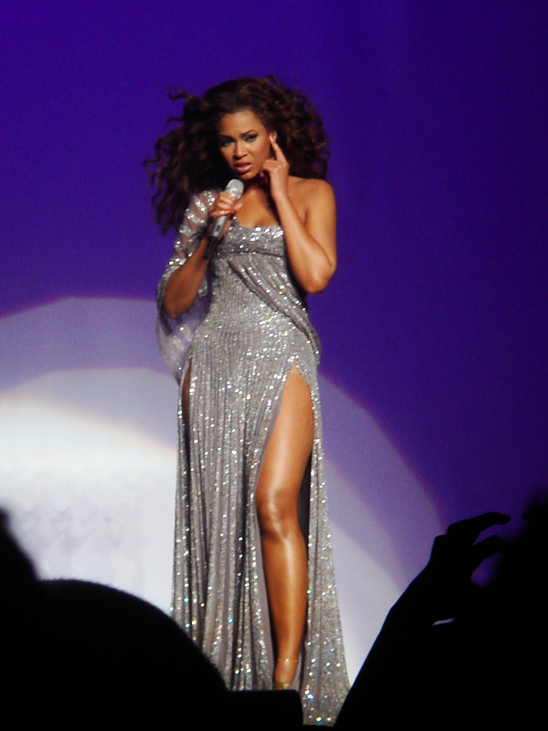 Beyoncé singing Listen